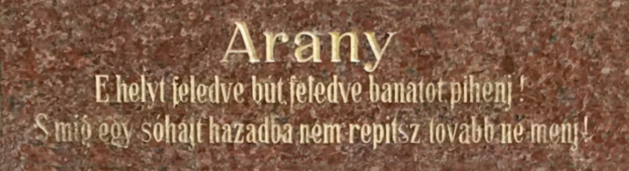 Nápis na Aranyho lavičce v lázeňských lesích v Karlových Varech